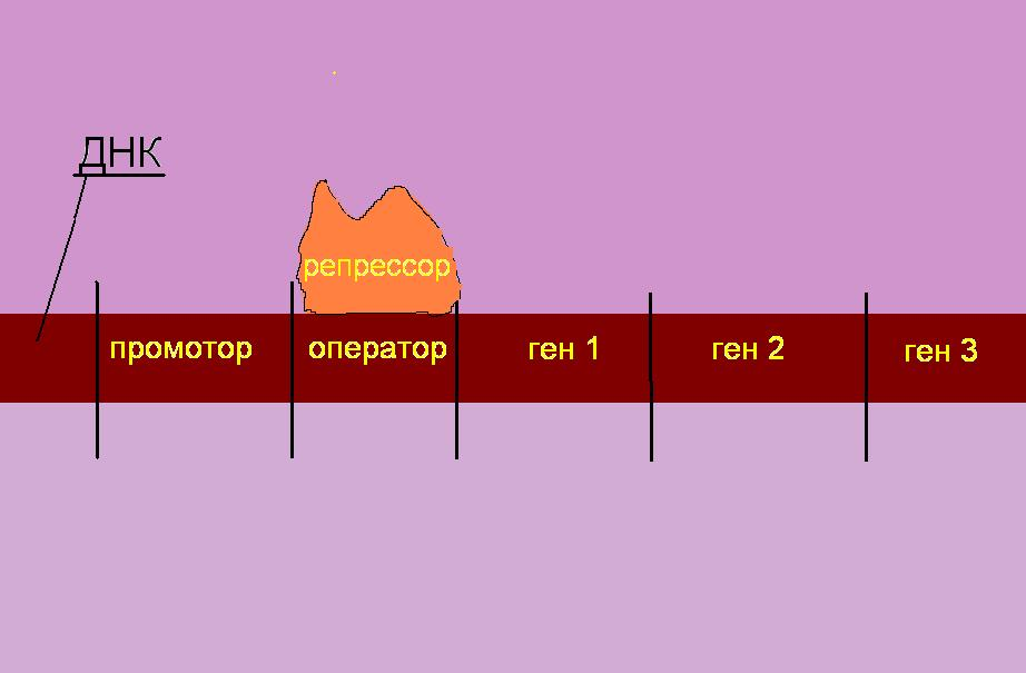 Иллюстрация к статье "Регуляция гидролиза лактозы у кишечной палочки". Схема строения ДНК и прикрепления к ней гена-репрессора.